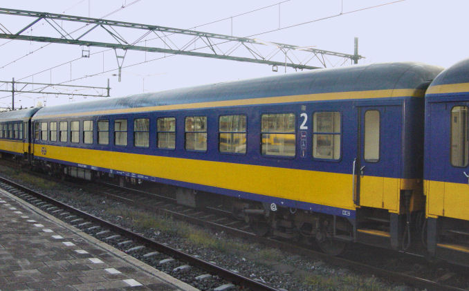 ICK-rijtuig op station Den Haag Centraal. Eigen foto Mark Voorendt, december 2004 Categorie:Afbeelding Nederlands spoorwegmaterieel